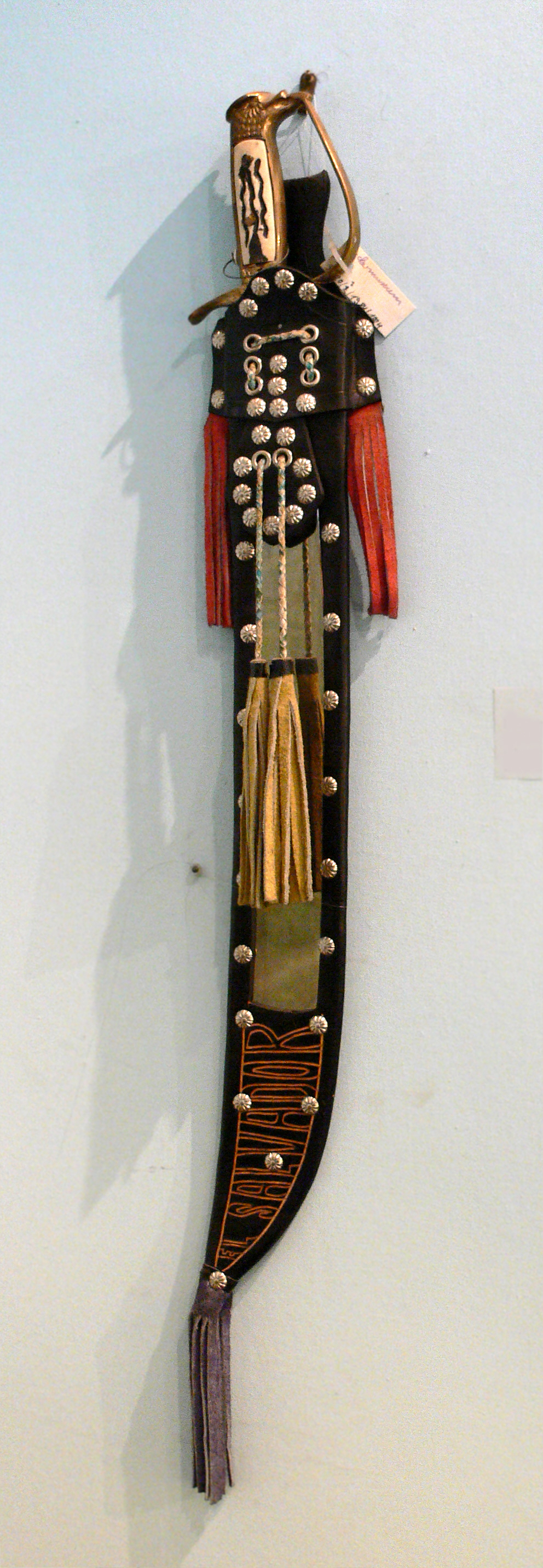 Prunk-Machete aus El Salvador, erste Hälfe 20. Jh.; benutzt zur jährlichen Eröffnung der Zuckerrohrerntesaison durch den Haziendero Zucker-Museum, Berlin